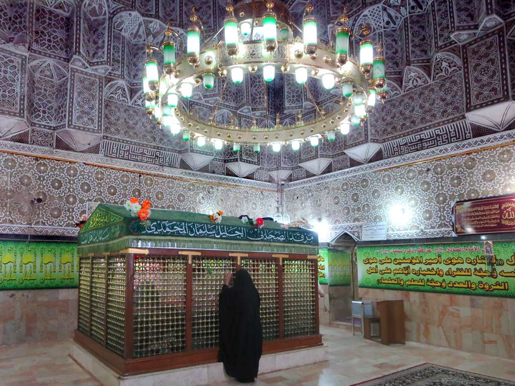 The tomb of Salman Al Farsi (568-655), the first Persian to convert to Islam, is at Madain south of Baghdad, Iraq. The word Mussalman may come from his name.